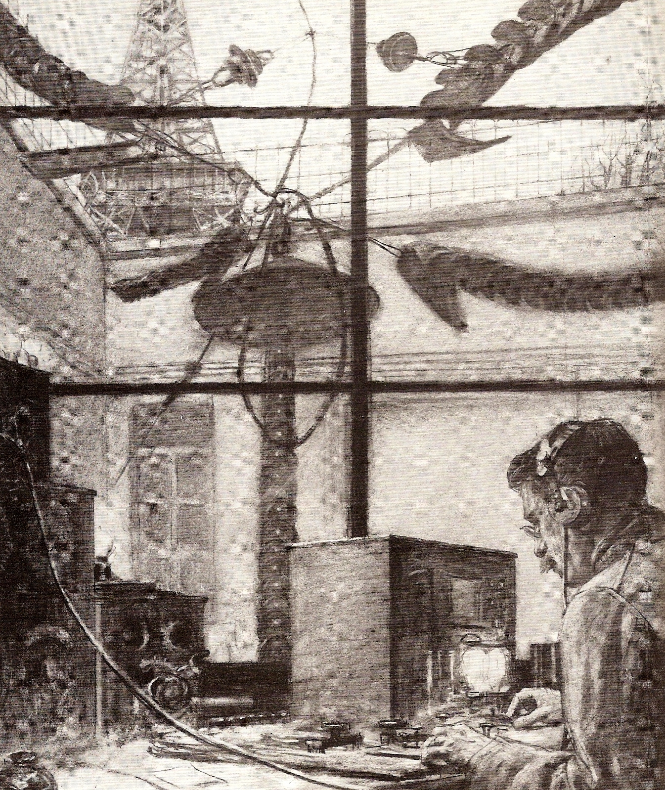 Cette station radiotélégraphique est installée en 1908, puis détruite par l’inondation de 1911 puis de nouveau reconstruite. Six brins d'antenne descendaient vers le sol du Champ-de-Mars à l'aide de câbles de tension reliés à des pylônes d'amarrage avant de pénétrer par un puits carré dans ce poste souterrain de TSF (télégraphie sans fil).